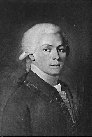 Count Sergei Kamensky (1771-1834)